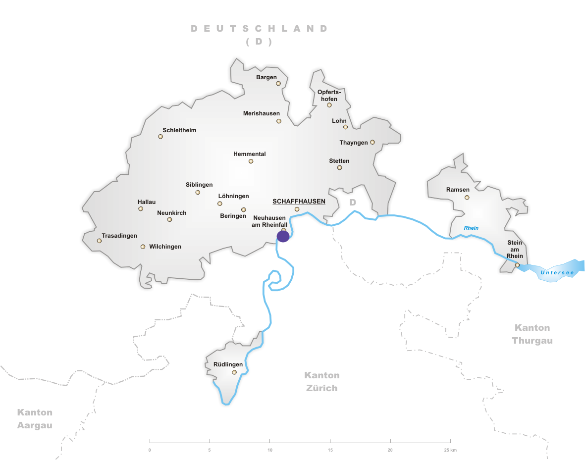 描述摘要